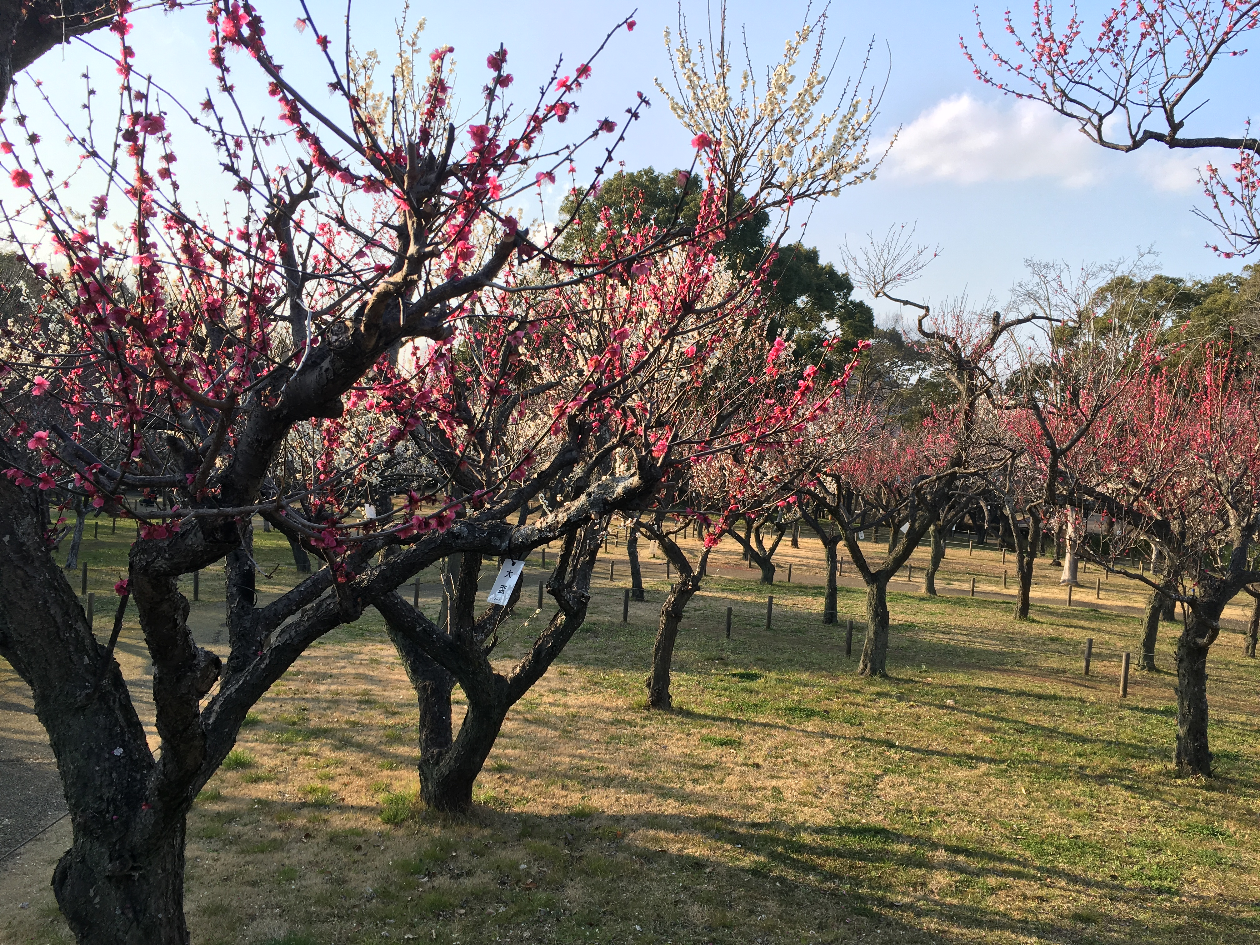 千葉県立青葉の森公園にある梅園の梅。中央の東屋から2019年3月5日撮影。